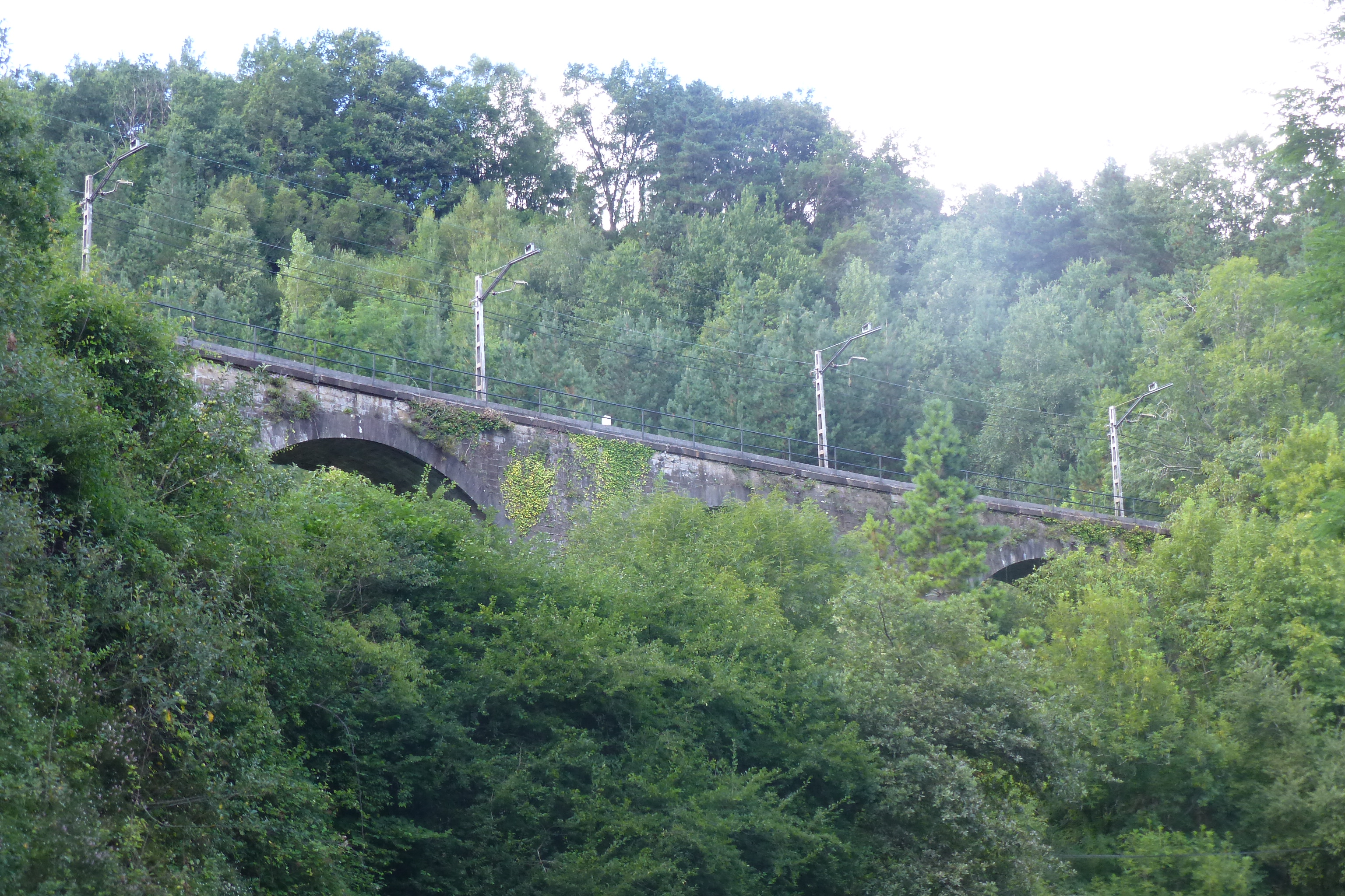 Viaducto de Torrebarria, oblicuo y de cinco arcos cuya máxima altura es de 27 metros por 2 de luz. Perteneciente a la línea férrea Amorebieta-Bermeo en Bizkaia, País Vasco, España.